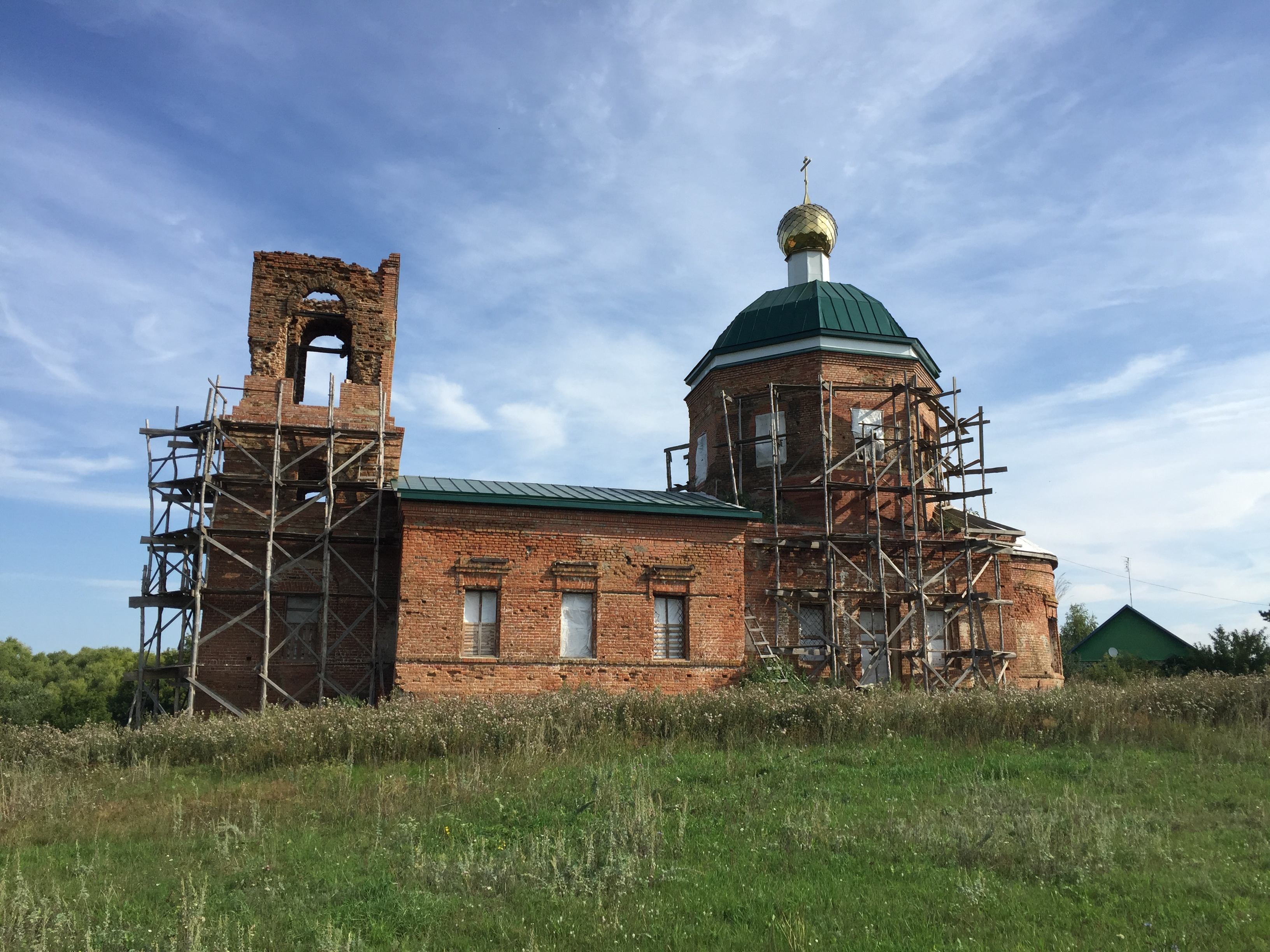 Свято-Никольский храм с.Воронцовка